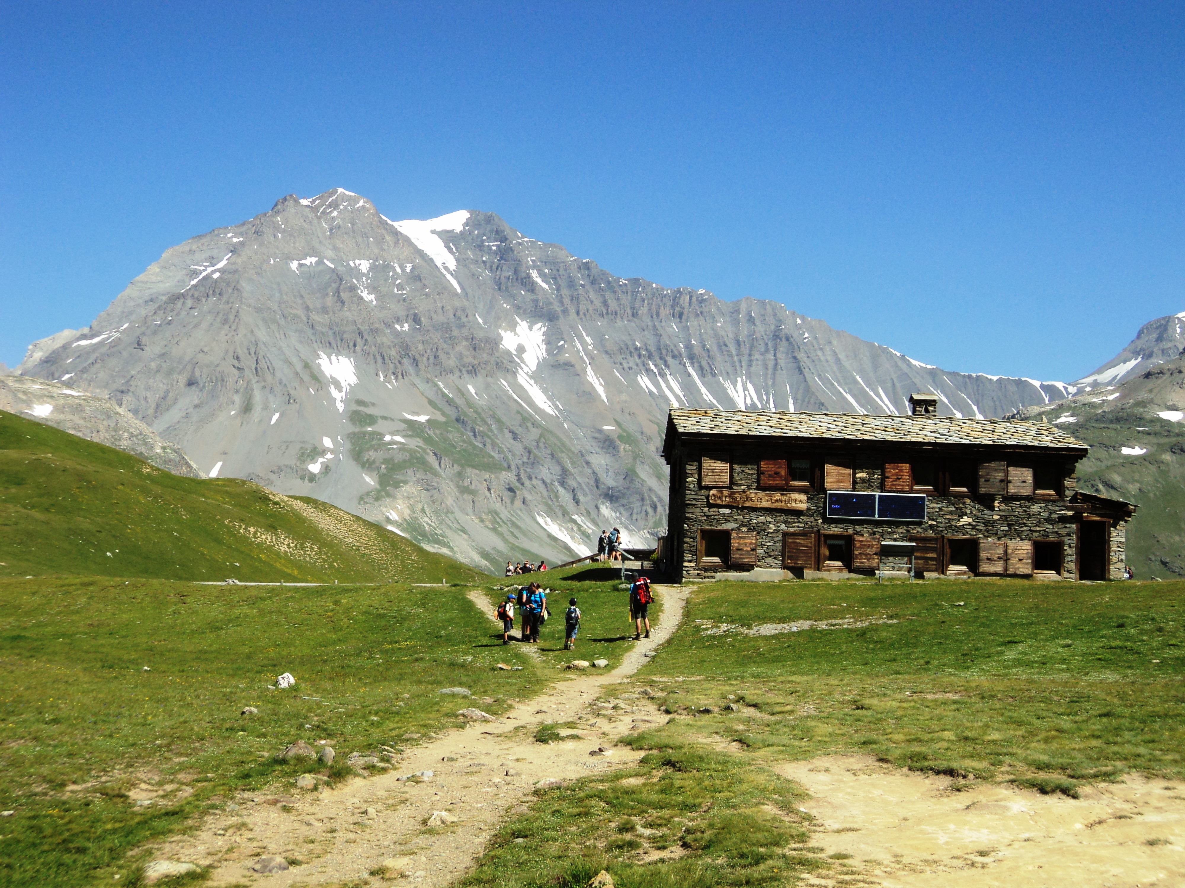 Il rifugio con sullo sfondo la Grande Casse